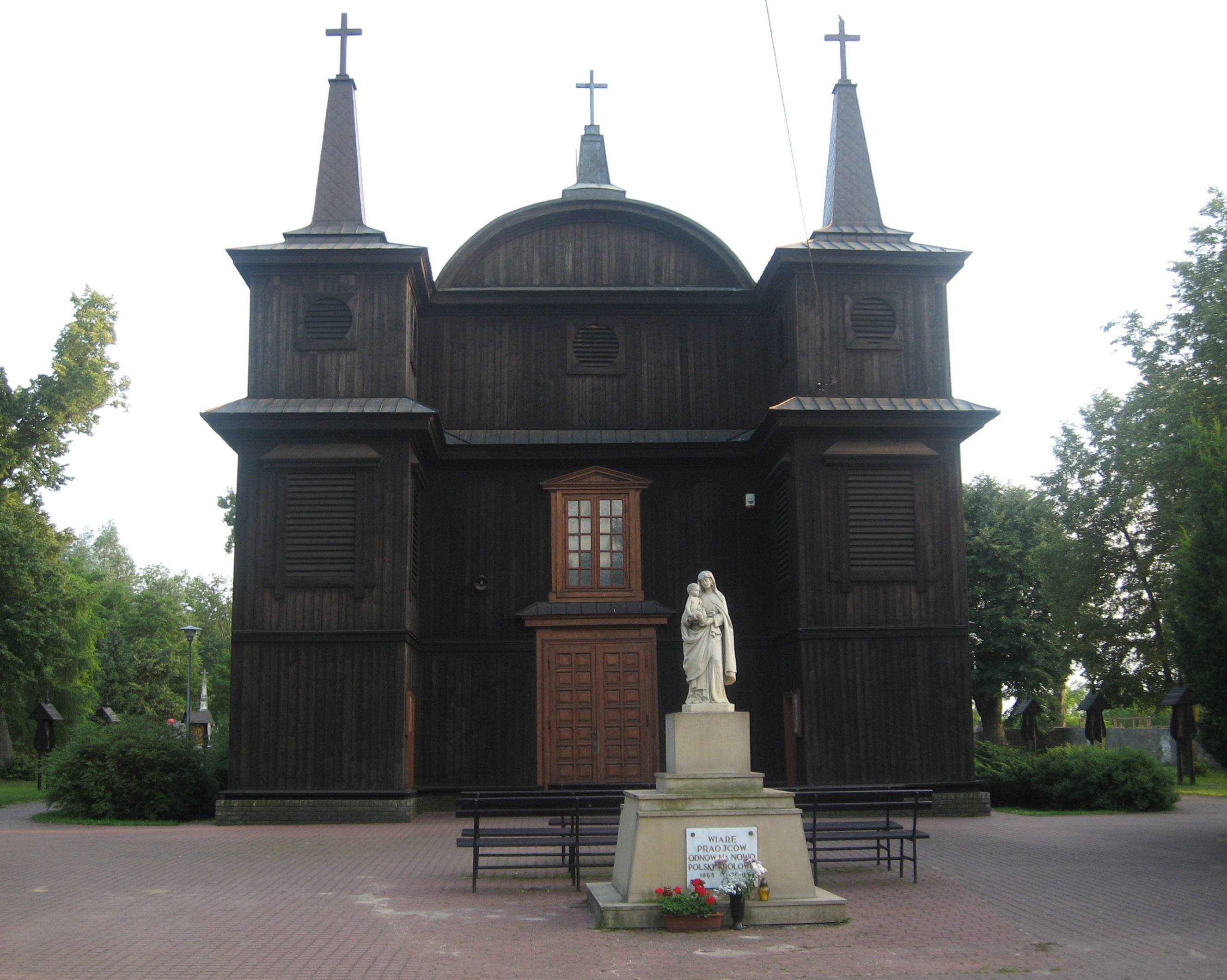 Kampinos - kościół pw. Wniebowzięcia NMP, drewn., przełom XVIII/XIX w. (zabytek nr 1041/604/62)